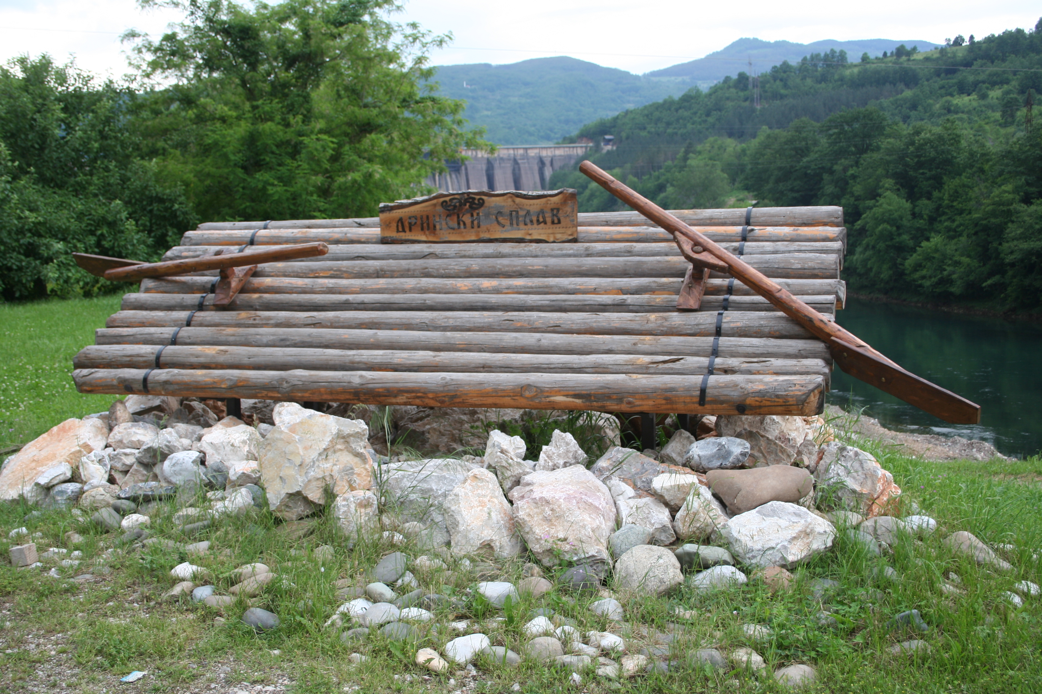 Reka Dina u Perućcu